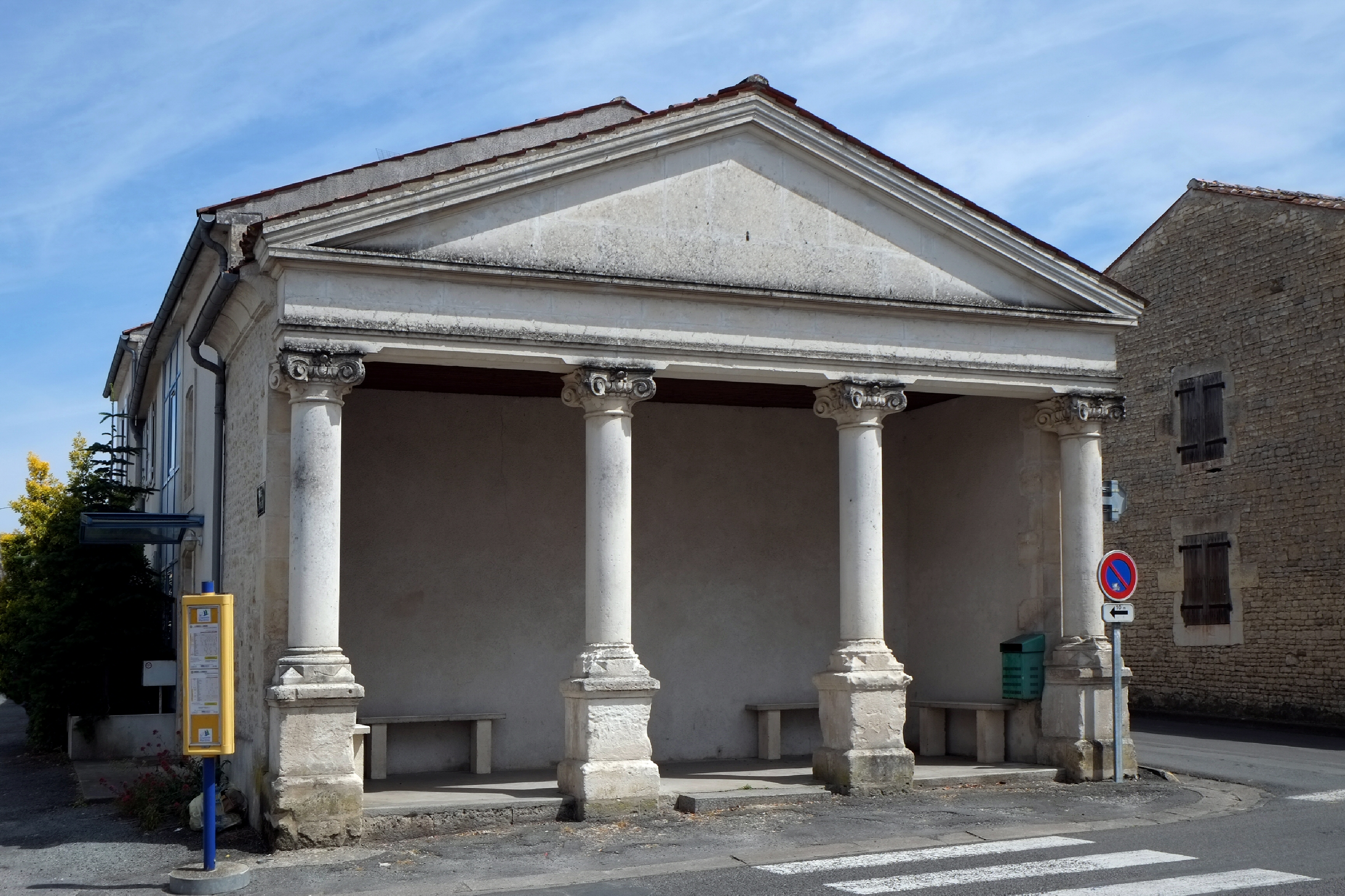 Le Panthéon Saint-Georges-du-Bois Charente-Maritime France